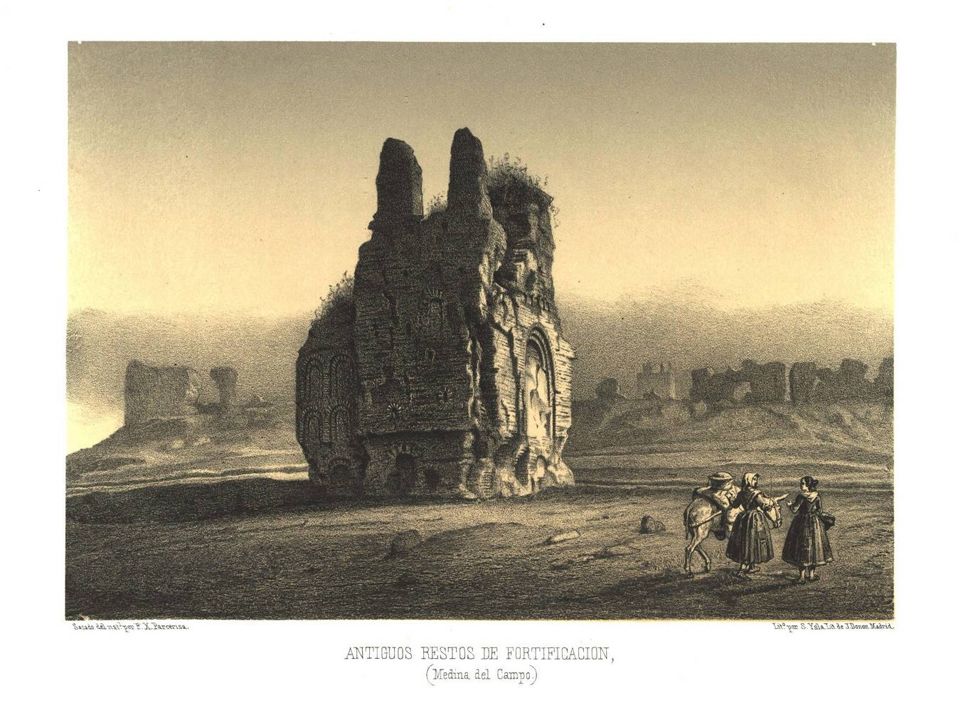 Litografía de Francisco Javier Parcerisa de los restos de una fortificación en Medina del Campo, publicada en el año 1861.